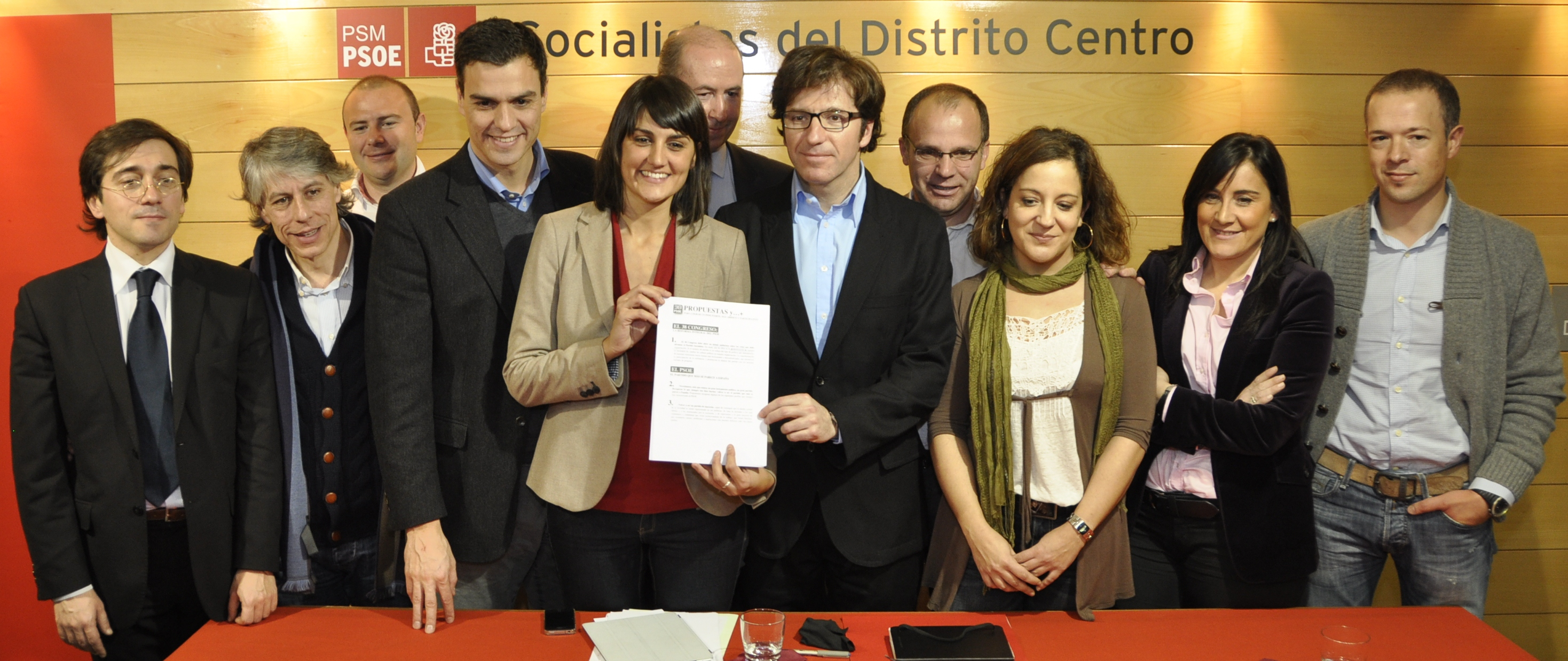 Présentation de la candidature de Rubalcaba à l'occasion du 38e congrès fédéral de 2012.